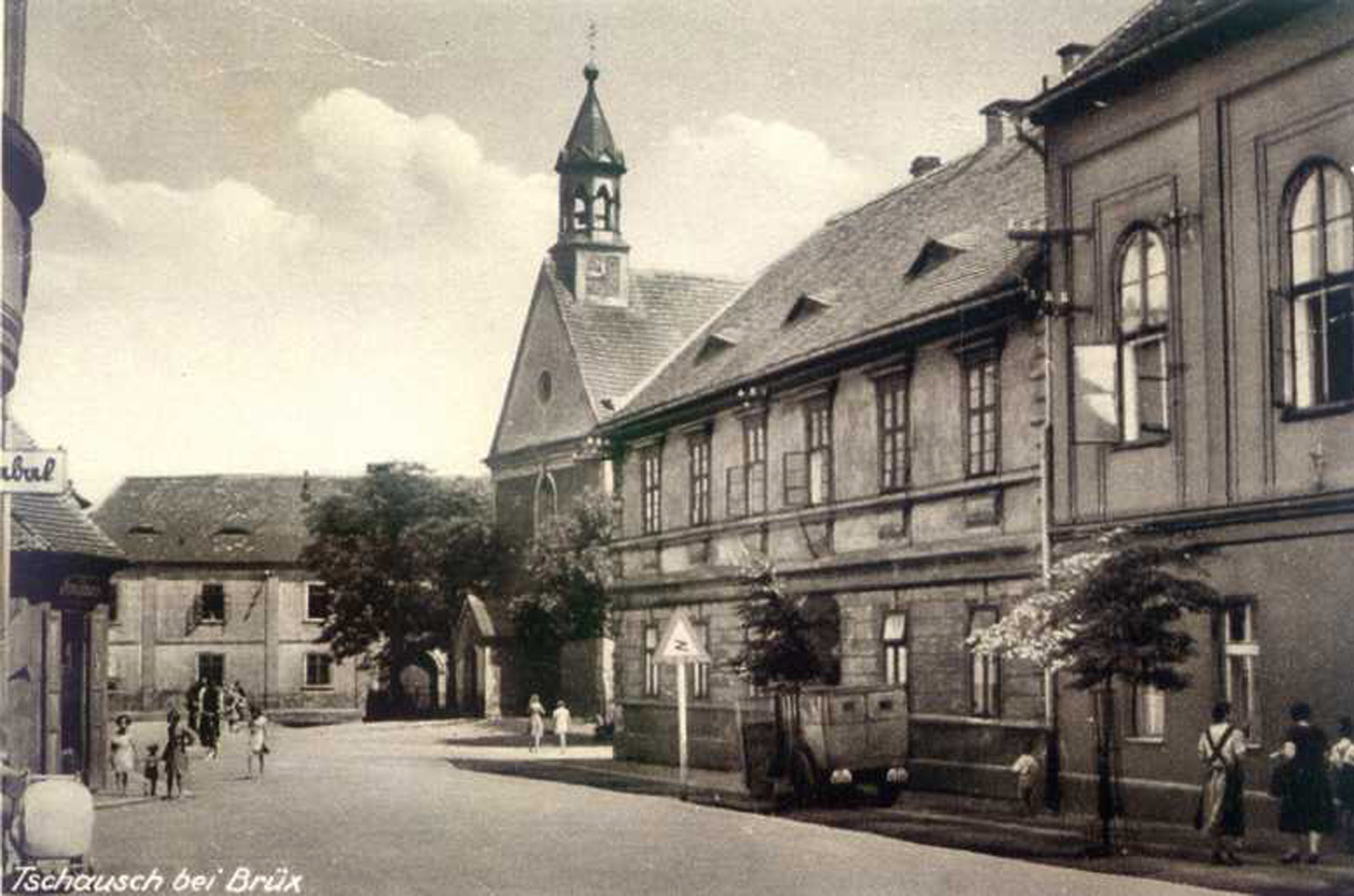 Dorf Souš (Tschausch) bei Most (Brüx) in Tschechien.